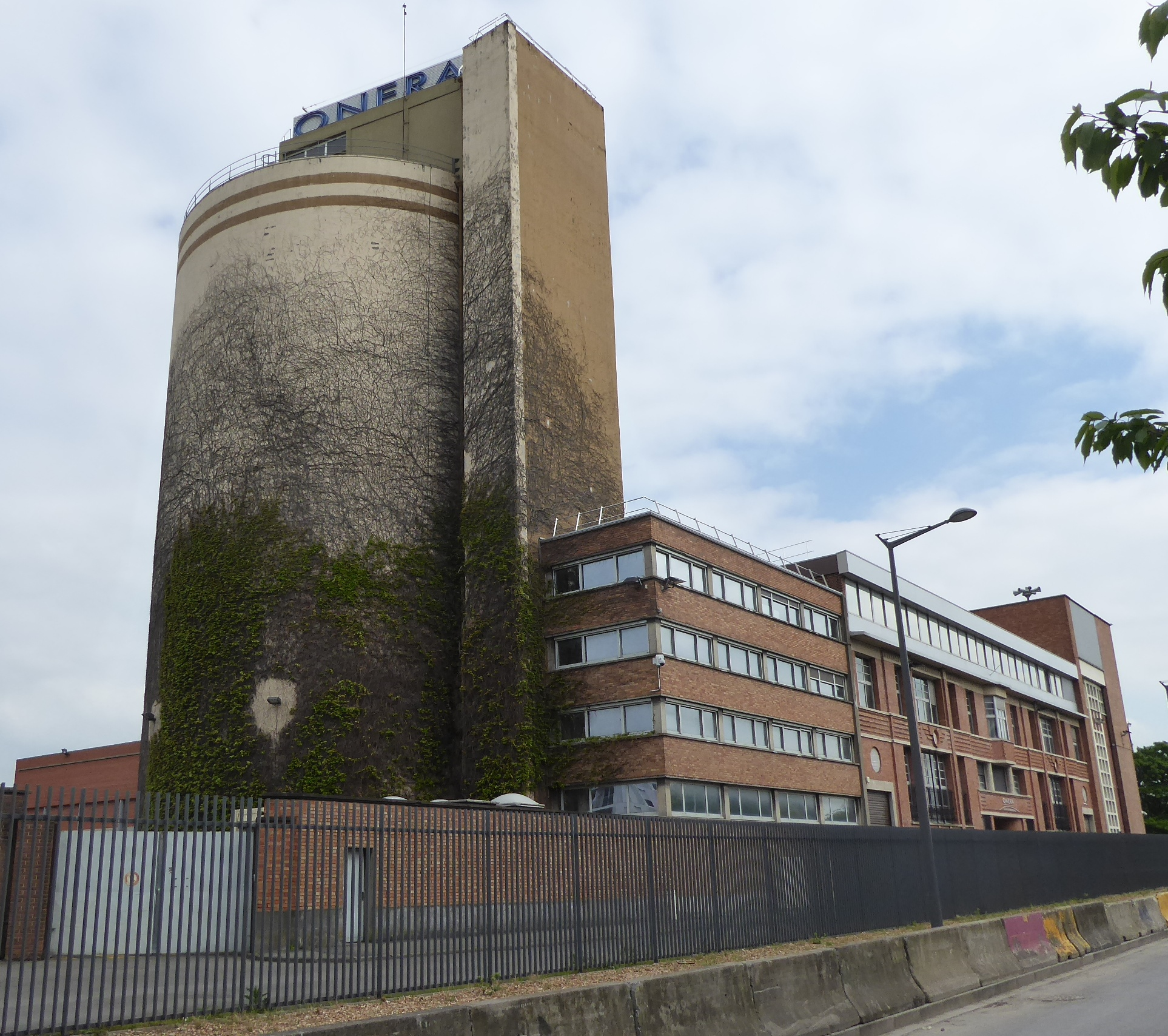 Institut de mécanique des fluides de Lille ONERA